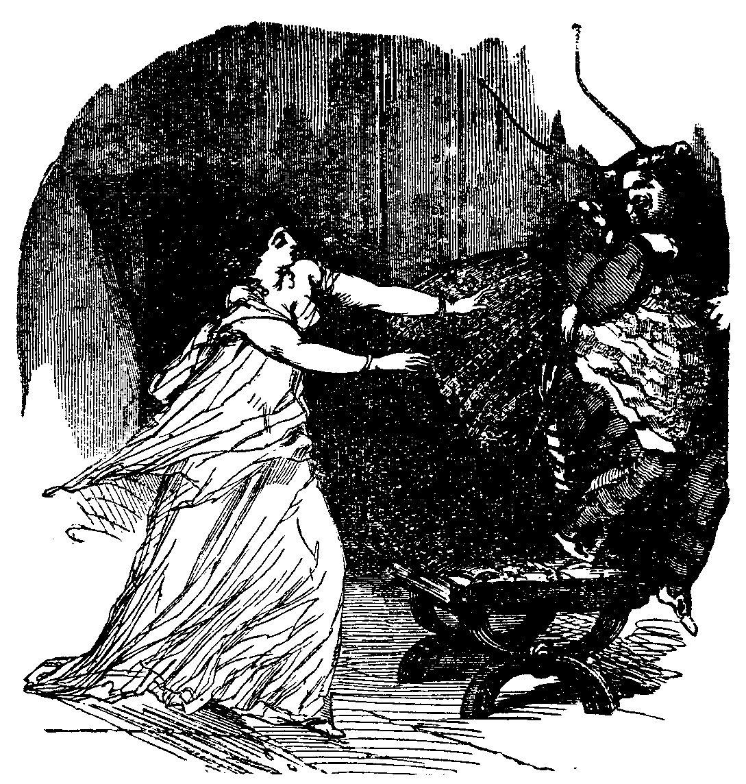 Un roi de Béotie - Orphée aux Enfers